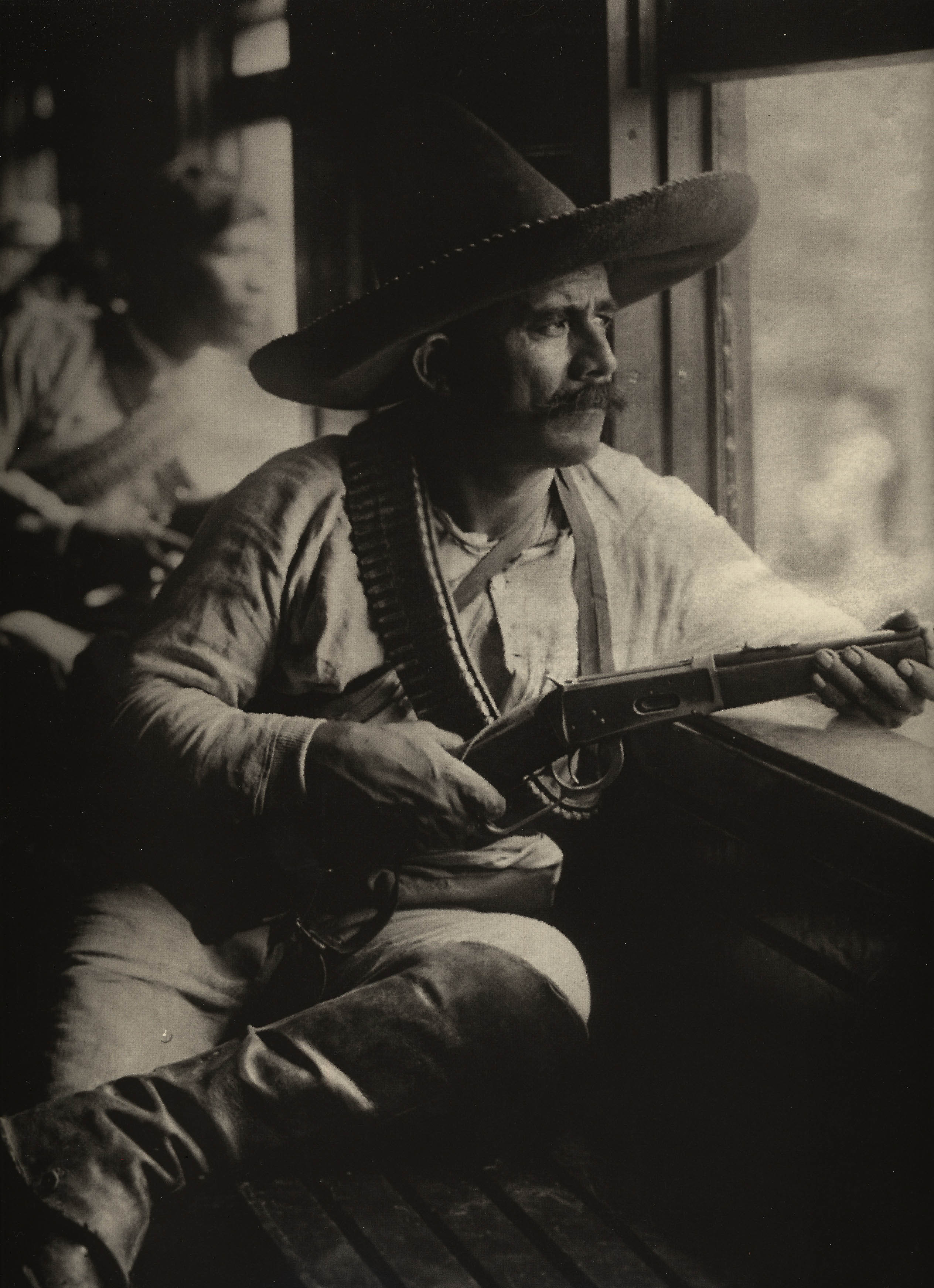 Miembro del Cuerpo de Policía Rural Mexicano en tren durante la Revolución Mexicana. Esta fotografía apareció publicada por primera vez en la Revista de Revistas. Mayo de 1912, por Manuel Ramos.